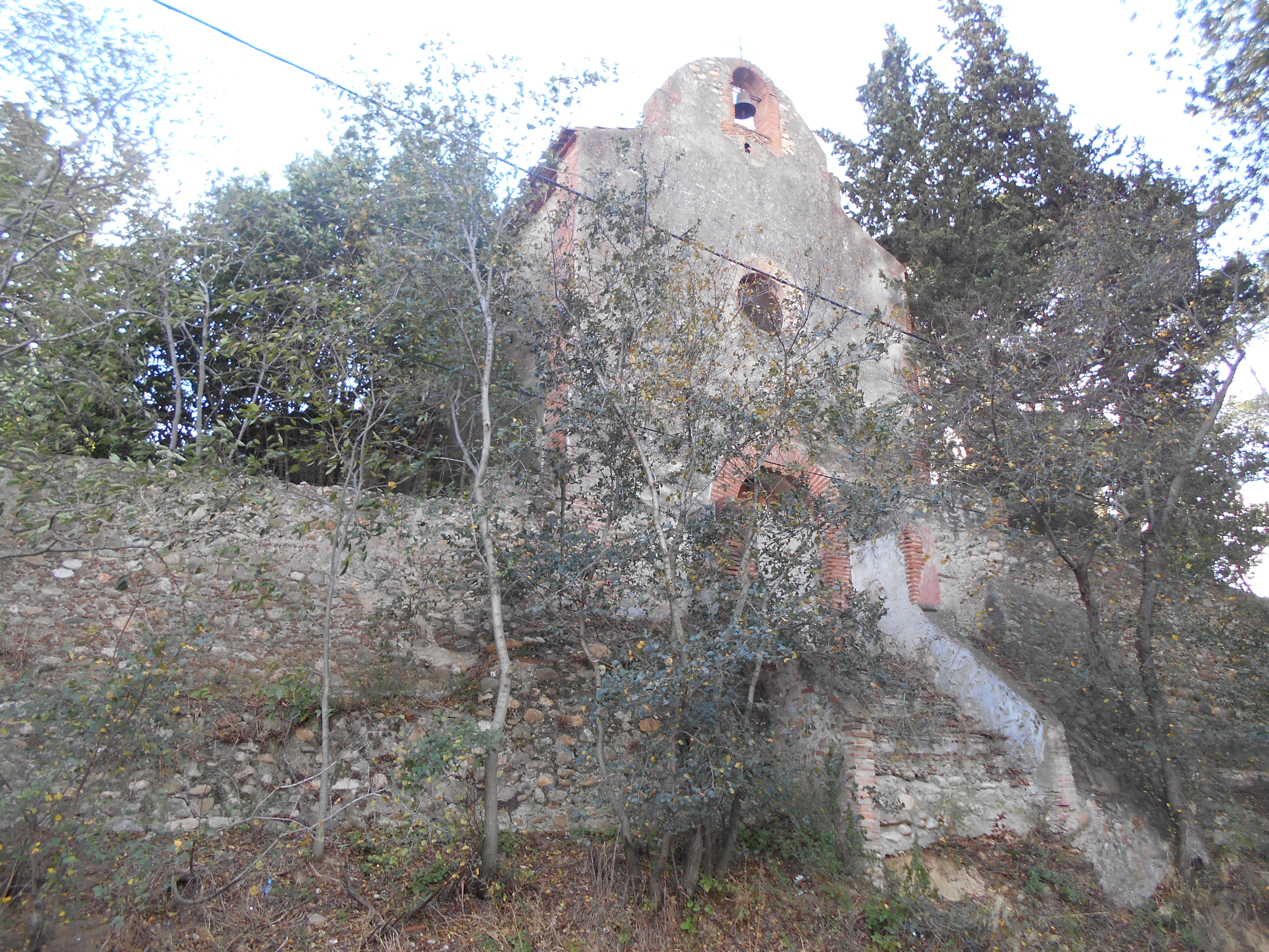 Capella de Santa Anna